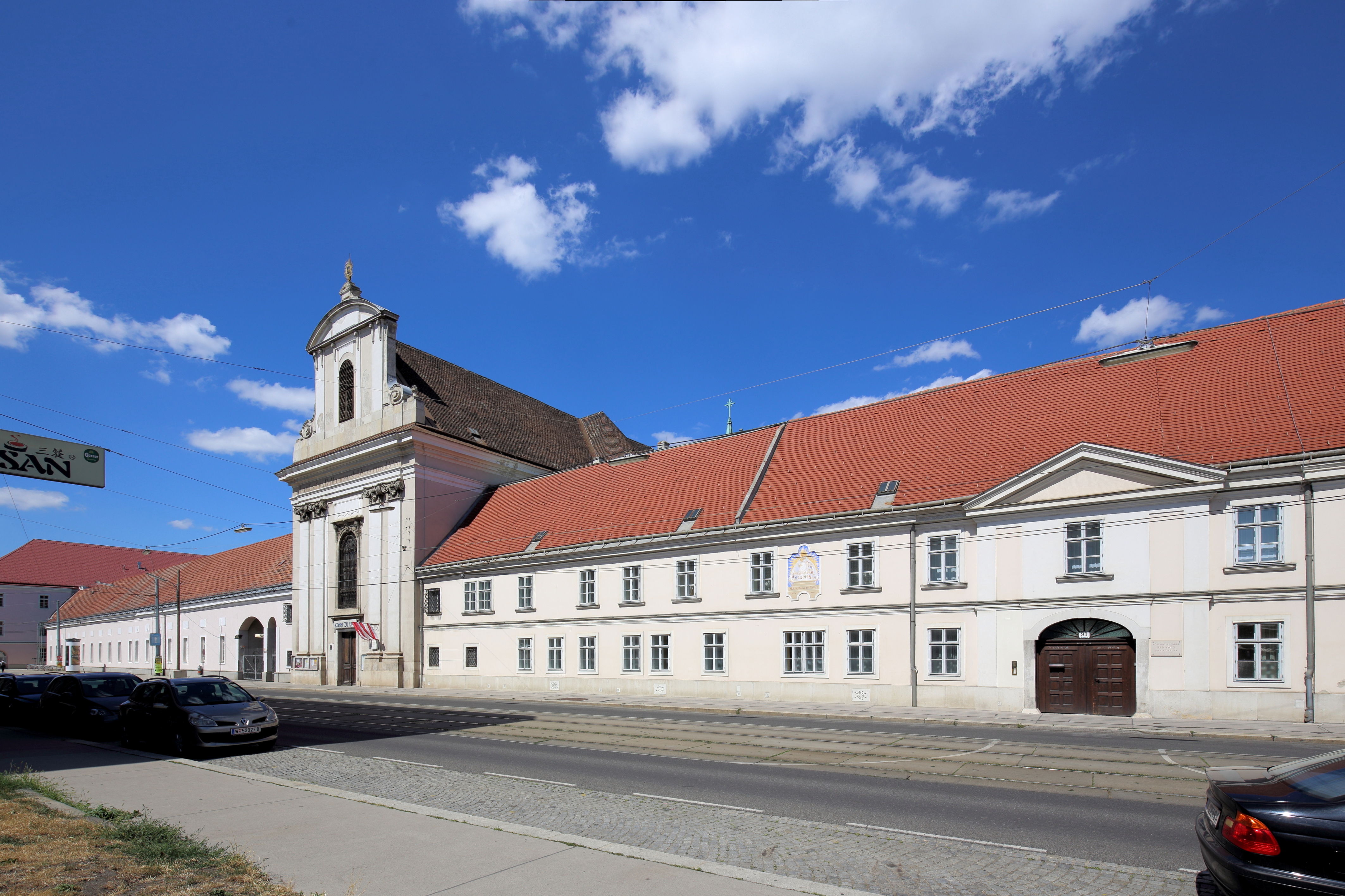 Das ehmalige Waisenhaus am Rennweg mit der röm.-kath. Pfarrkirche Mariä Geburt im 3. Wiener Gemeindebezirk Landstraße.Ab 1745 errichtet. 1785 wurde das Waisenhaus auf den Alsergrund verlegt und die Bauten zu einer Artilleriekaserne adaptiert.